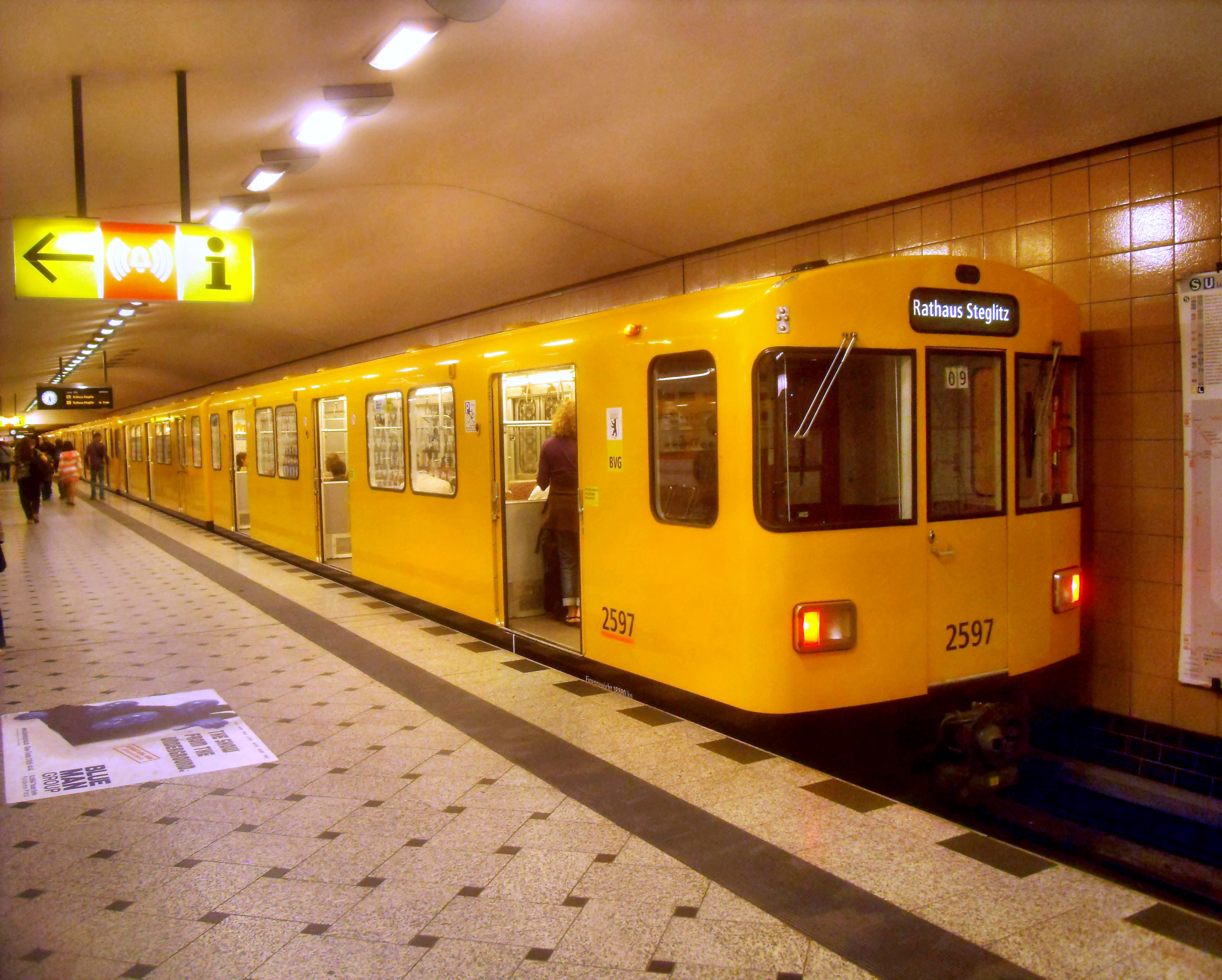 U-Bahn-Triebwagen der BVG-Baureihe F der U-Bahn Berlin im U-Bahnhof Zoologischer Garten auf der Linie U 9 auf dem Weg nach Rathaus Steglitz in Berlin in Deutschland